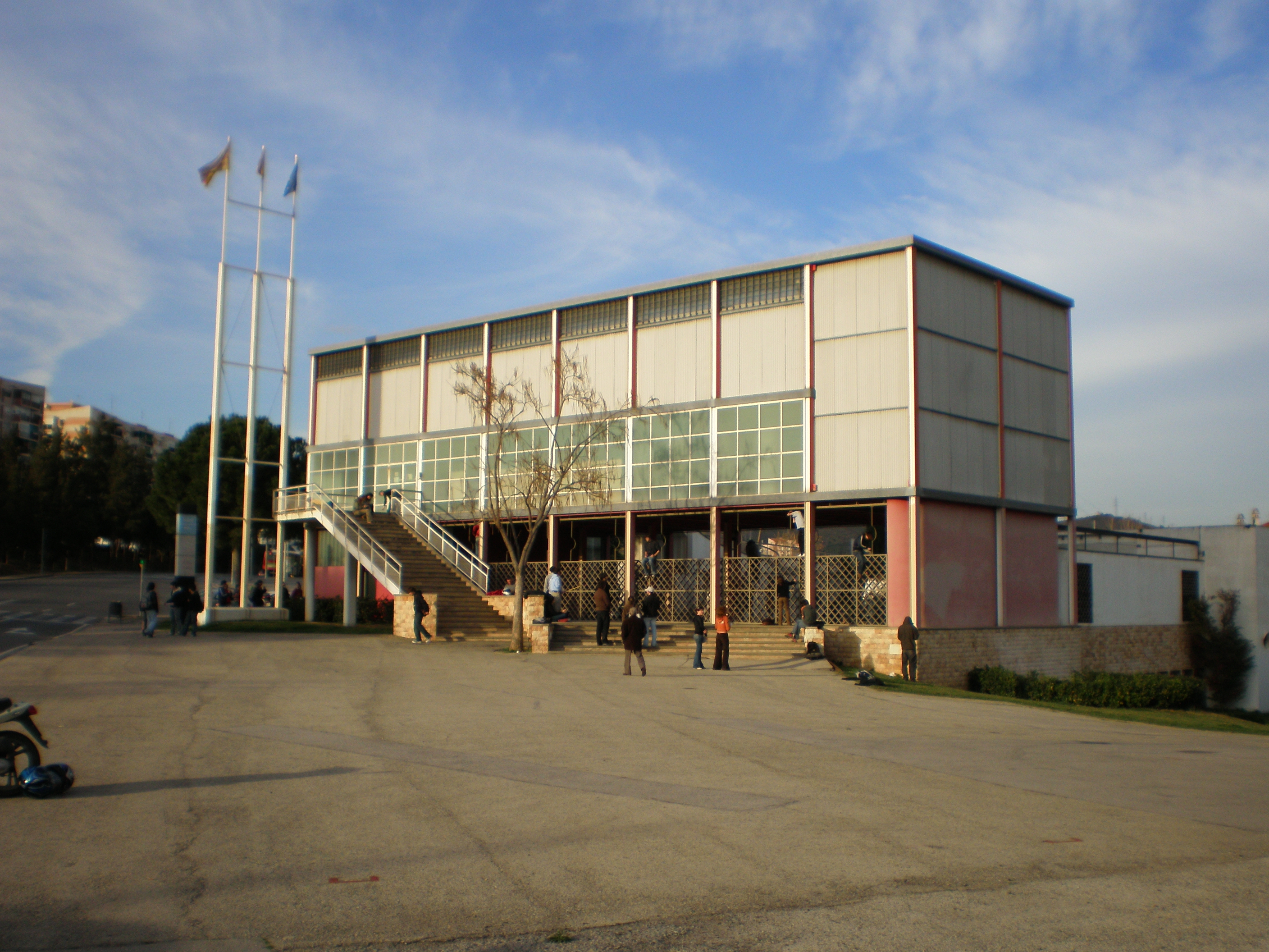 Rèplica del Pavelló de la República Espanyola de Josep Lluís Sert que es va construir en l'Exposició Unirversal de París de 1937 i en el qual es va presentar el Guernica de Picasso. El 1992 es va fer aquesta rèplica a Barcelona que forma part de la Universitat de Barcelona i allotja una biblioteca.